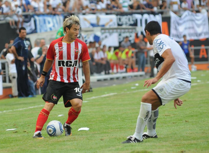 Gastón Fernández, delantero de Estudiantes, enfrenta a Ariel Agüero, de Gimnasia, durante el clásico platense del 5 de marzo de 2011 que se jugó en el Estadio Ciudad de La Plata, por la 4ta. fecha del Torneo Clausura de Primera División de Argentina, con triunfo de Estudiantes por 2-0.